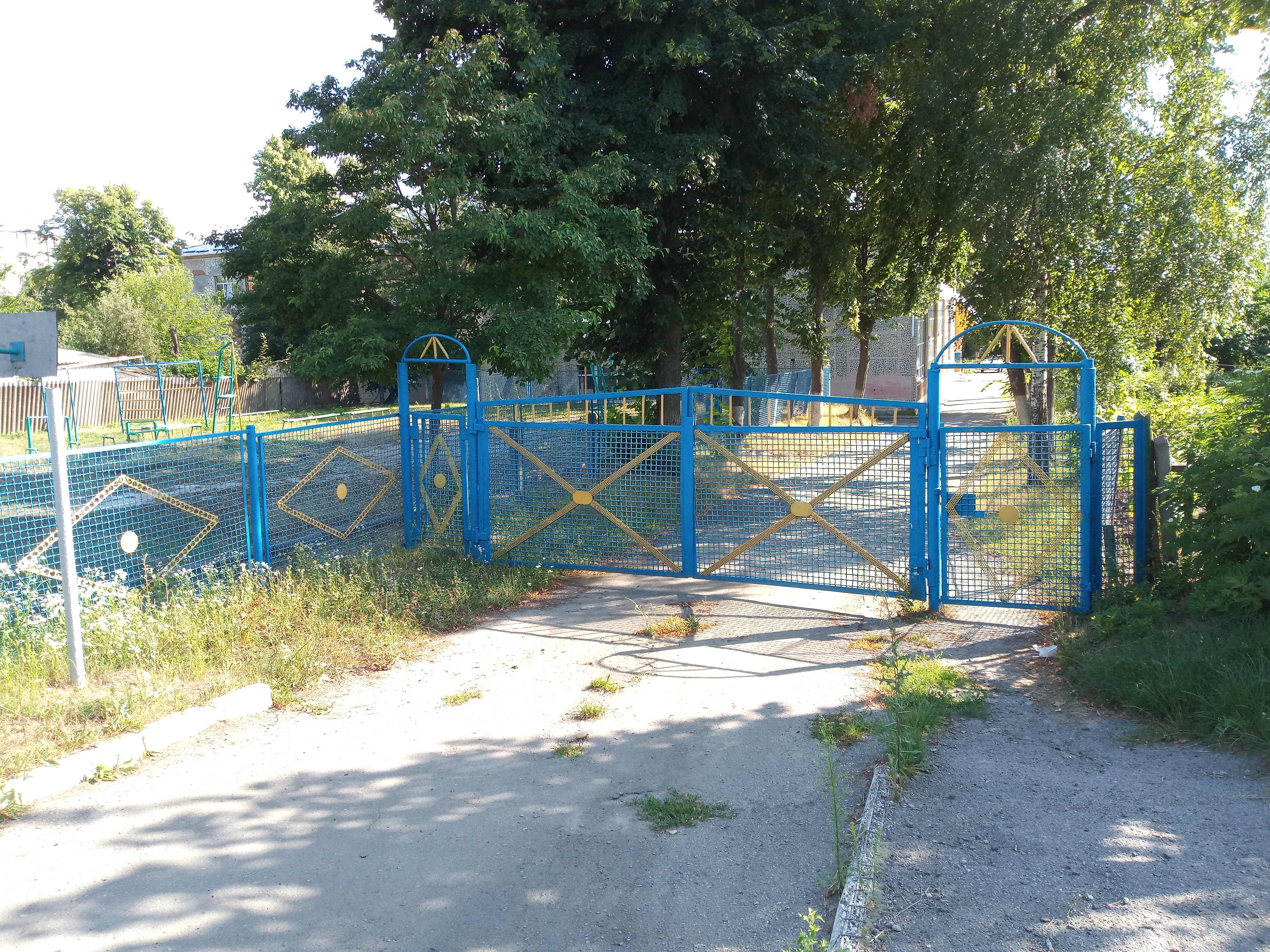 Загальноосвітня школа №6 у Жмеринці, в'їзд зі сторони вул. Магістральної